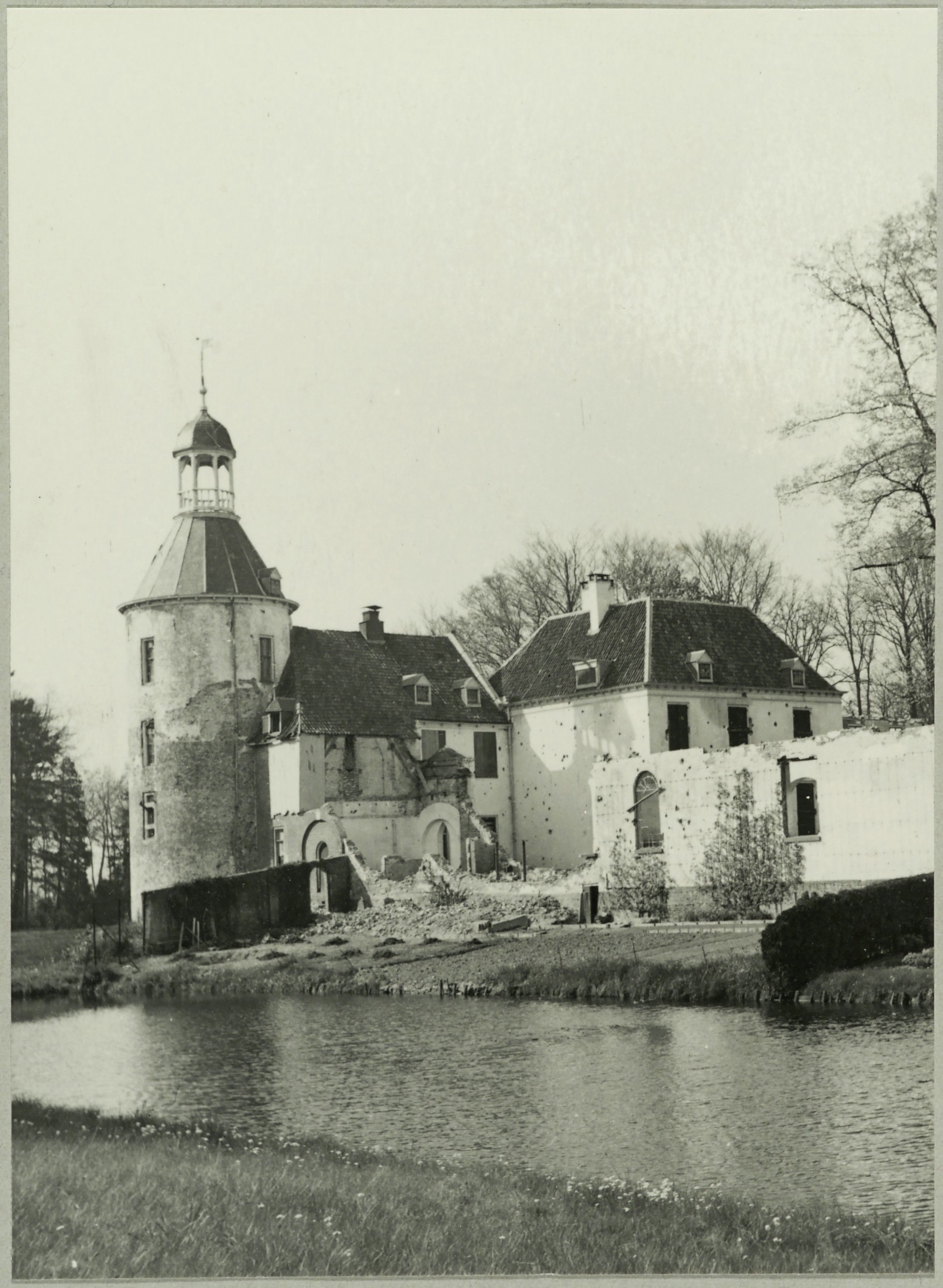 Kasteel Wisch: Overzicht kasteel met schade na oorlogshandelingen